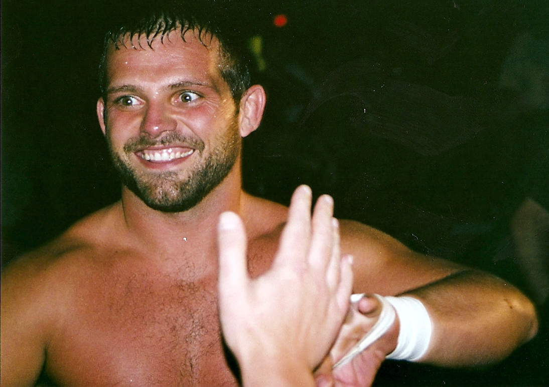 Jamie Gbison aka Jasmie Noble